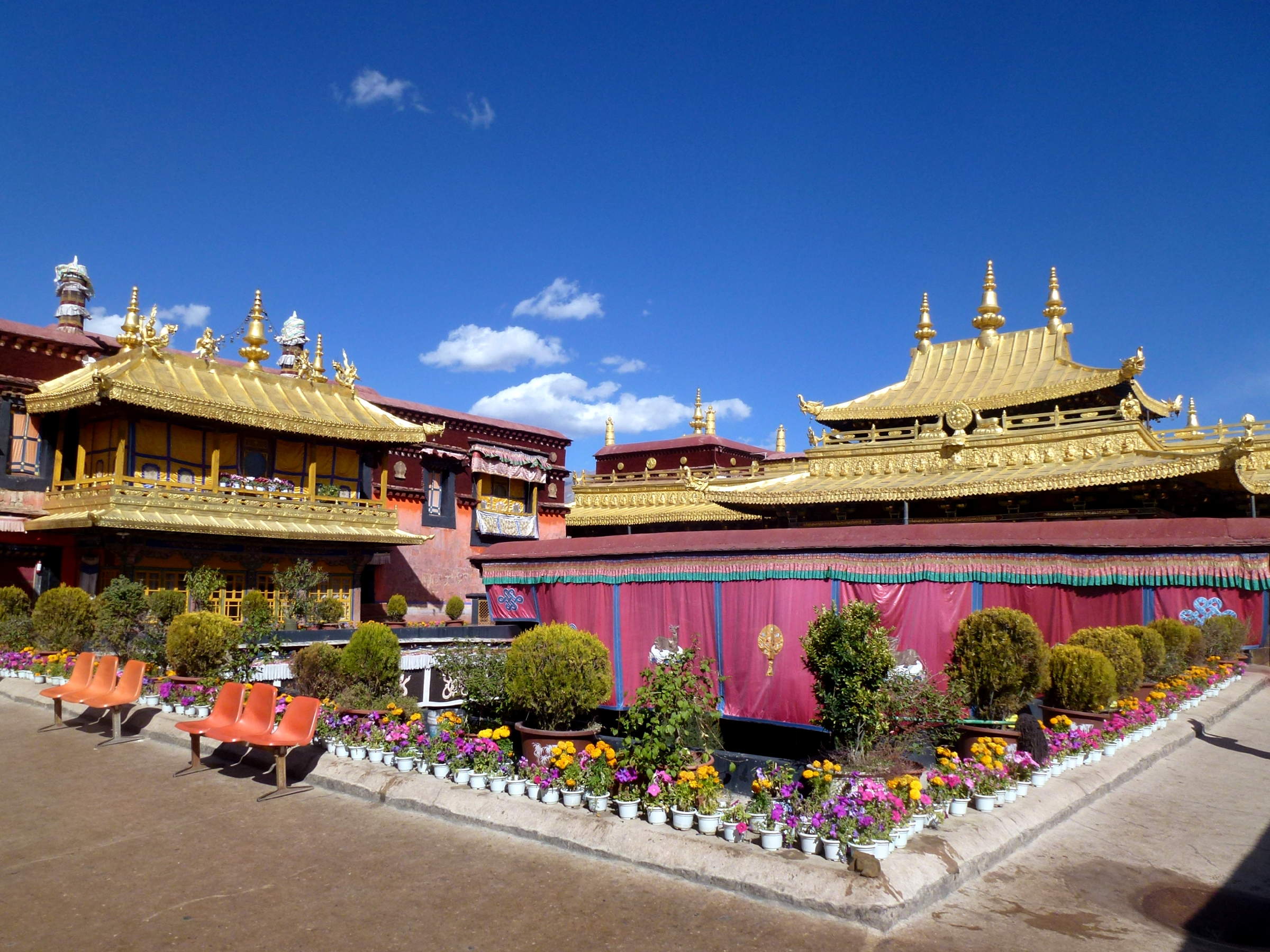 Jokhang Temple Lhasa Tibet China 西藏 拉萨 大昭寺